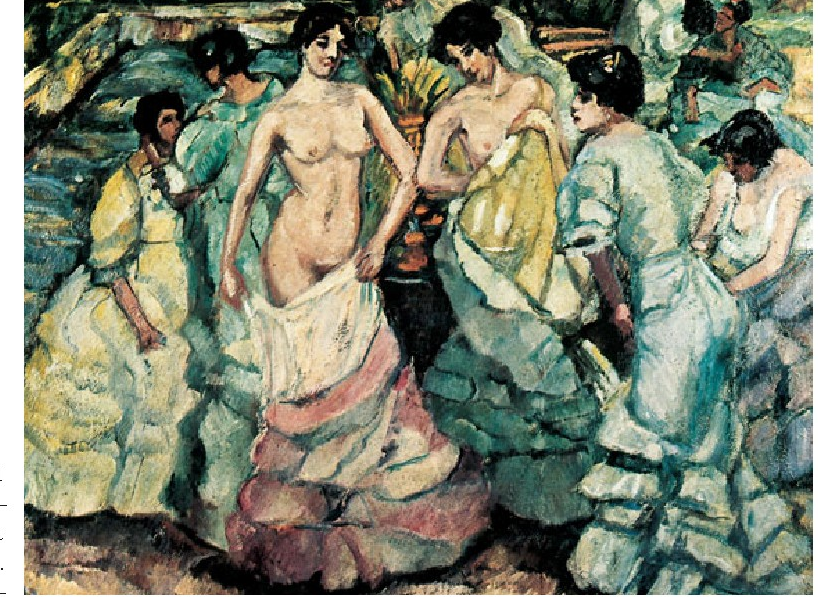 “Mujeres desnudándose”, Francisco Iturrino